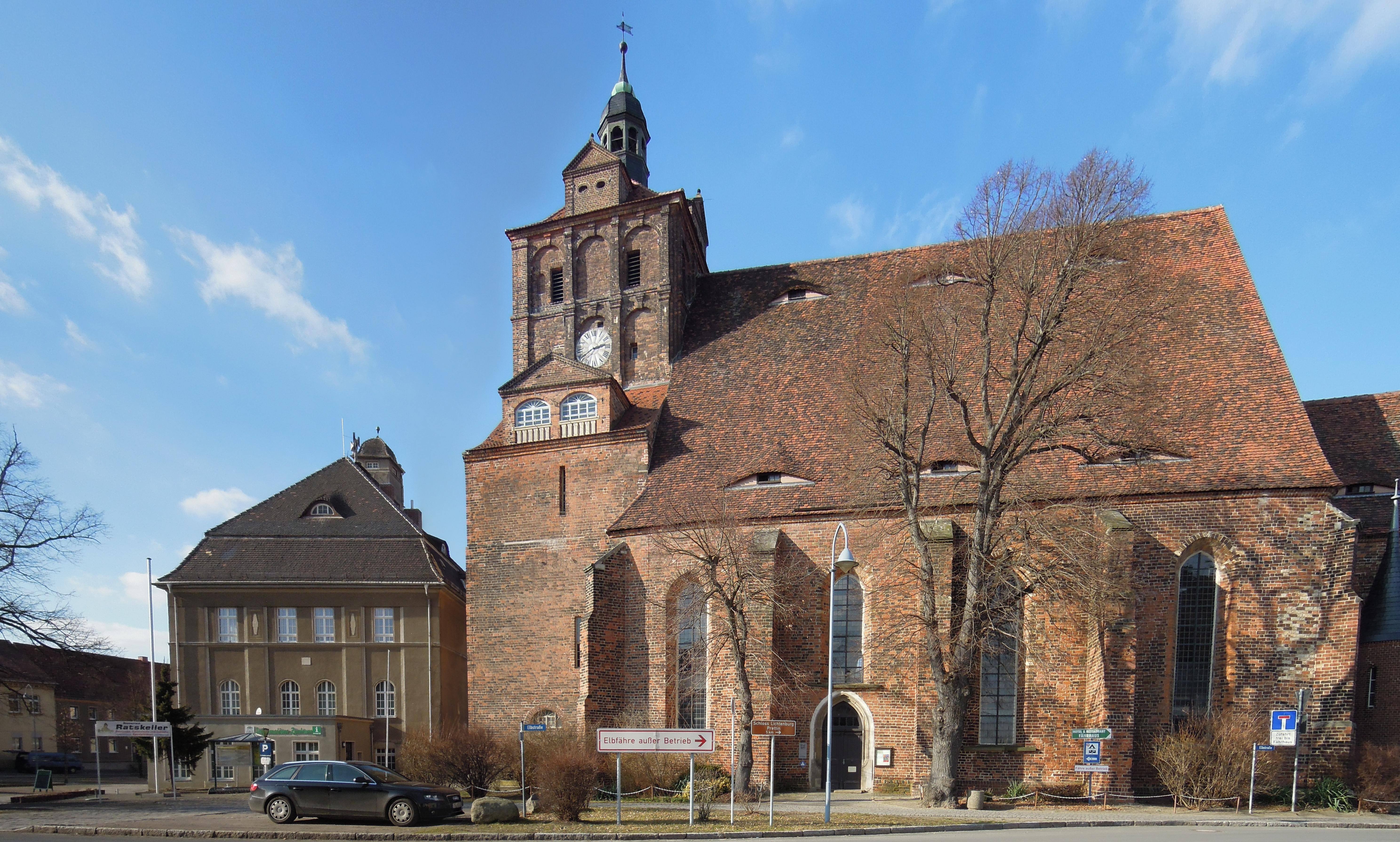 Dommitzscher Sankt Marienkirche nebst Rathaus 2015. Erstellt mit der Open-Source-Software Hugin aus 3 Hochkant-Einzelbildern und der Projektionsmethode 'Biplane'.